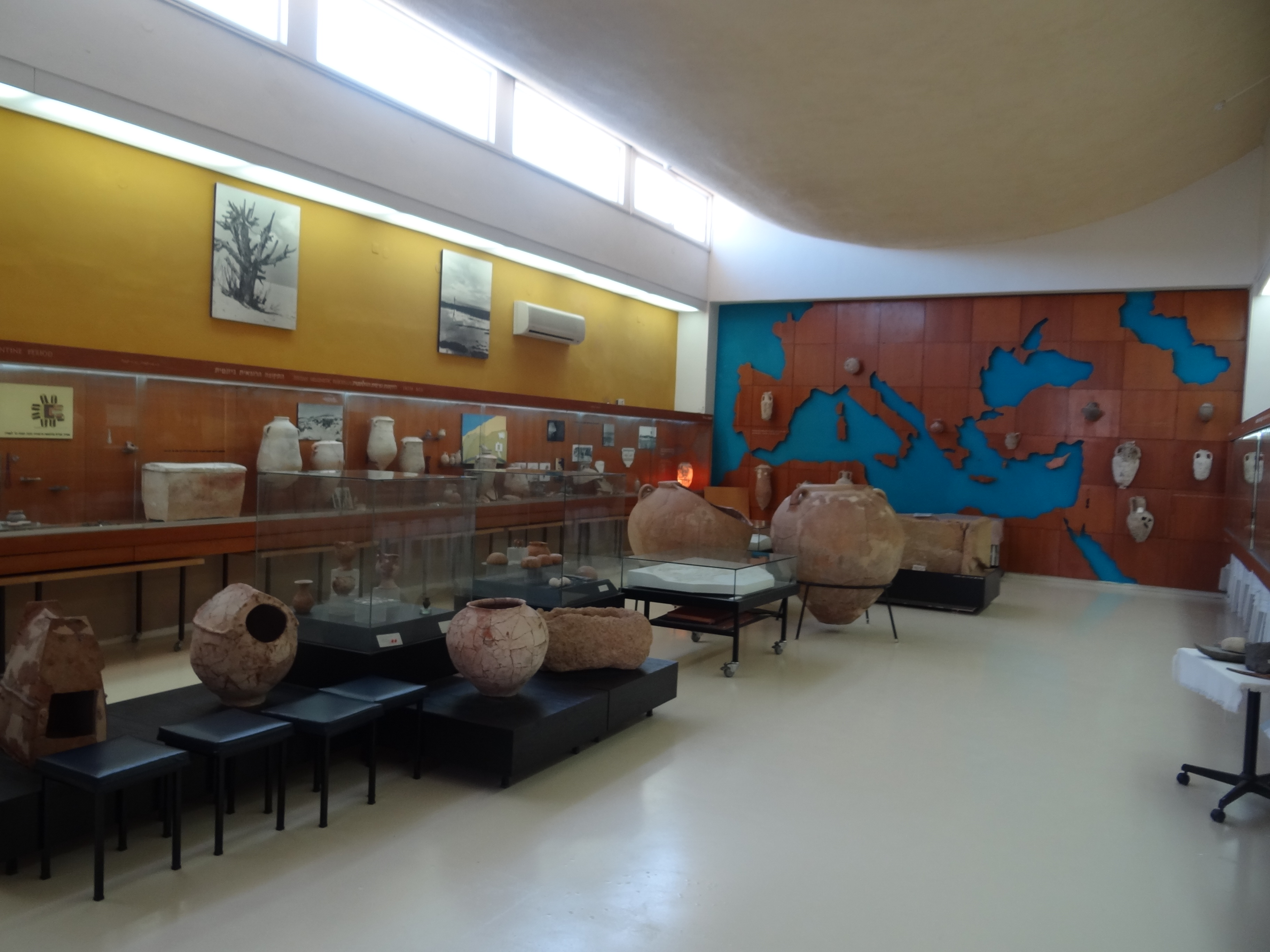 Archaeological Museum Beit Miriam in kibutz Palmahim, Israel מוזיאון בית מרים - הים ומלואו" הוא מוזיאון לארכאולוגיה השוכן בקיבוץ פלמחים מעל מצוק הצופה לים. המוזיאון מתרכז בממצאים ארכאולוגים שנחפרו באזור הקרוב לפלמחים, בחלקו התחתון של ערוץ נחל שורק וממצאים שנמשו מהים בקרבת הקיבוץ. האגף הותיק בקצה החדר מפה מוארת להכרת והמחשת השייט והסחר בים התיכון בתקופות קדומות